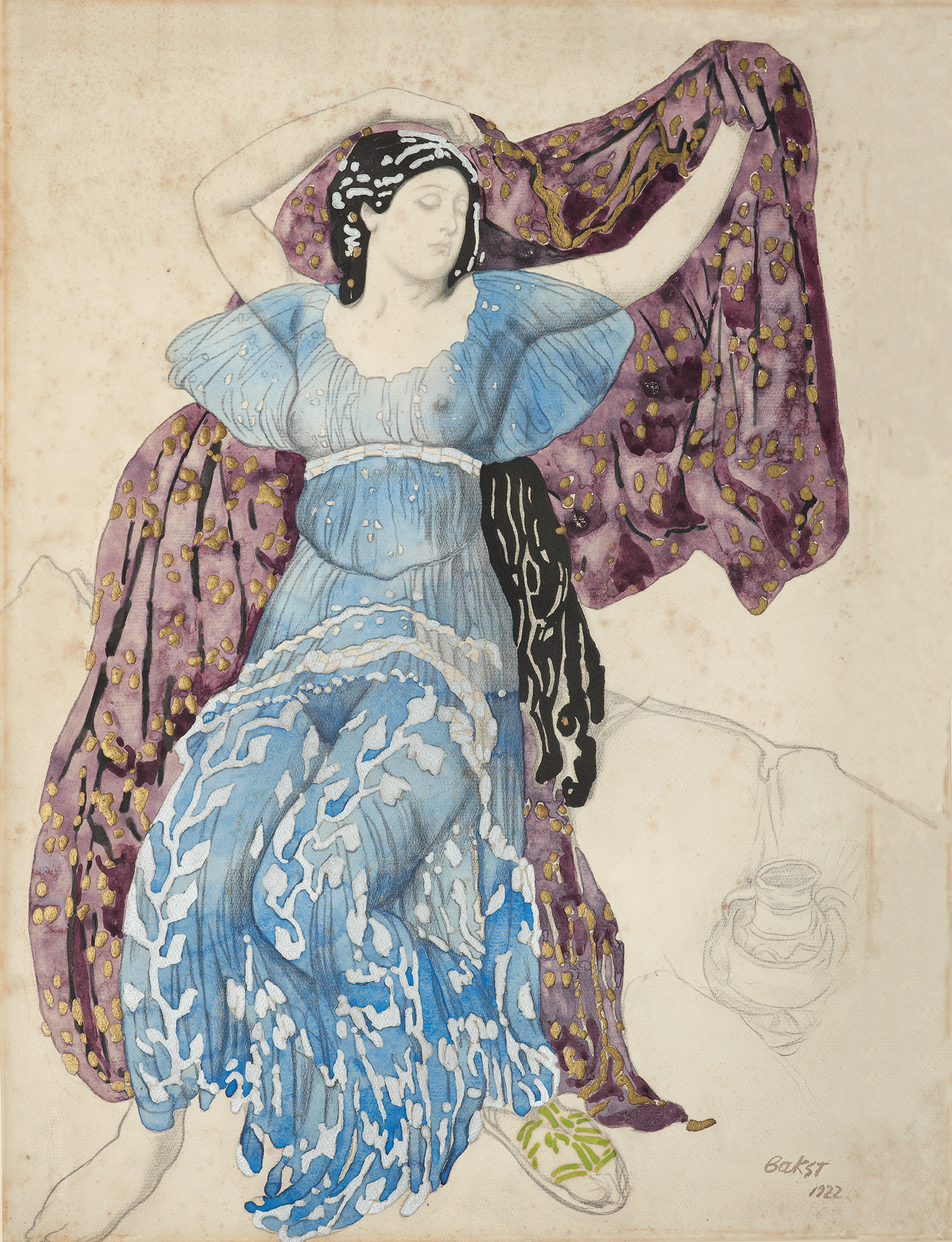 Narcisse ballet, The Nymph Echo Эхо покинутая. Эскиз костюма Повторение эскиза 1911 г. Бумага верже, карандаш, акварель, серебряная и золотая краска. 66 × 48.2 cm